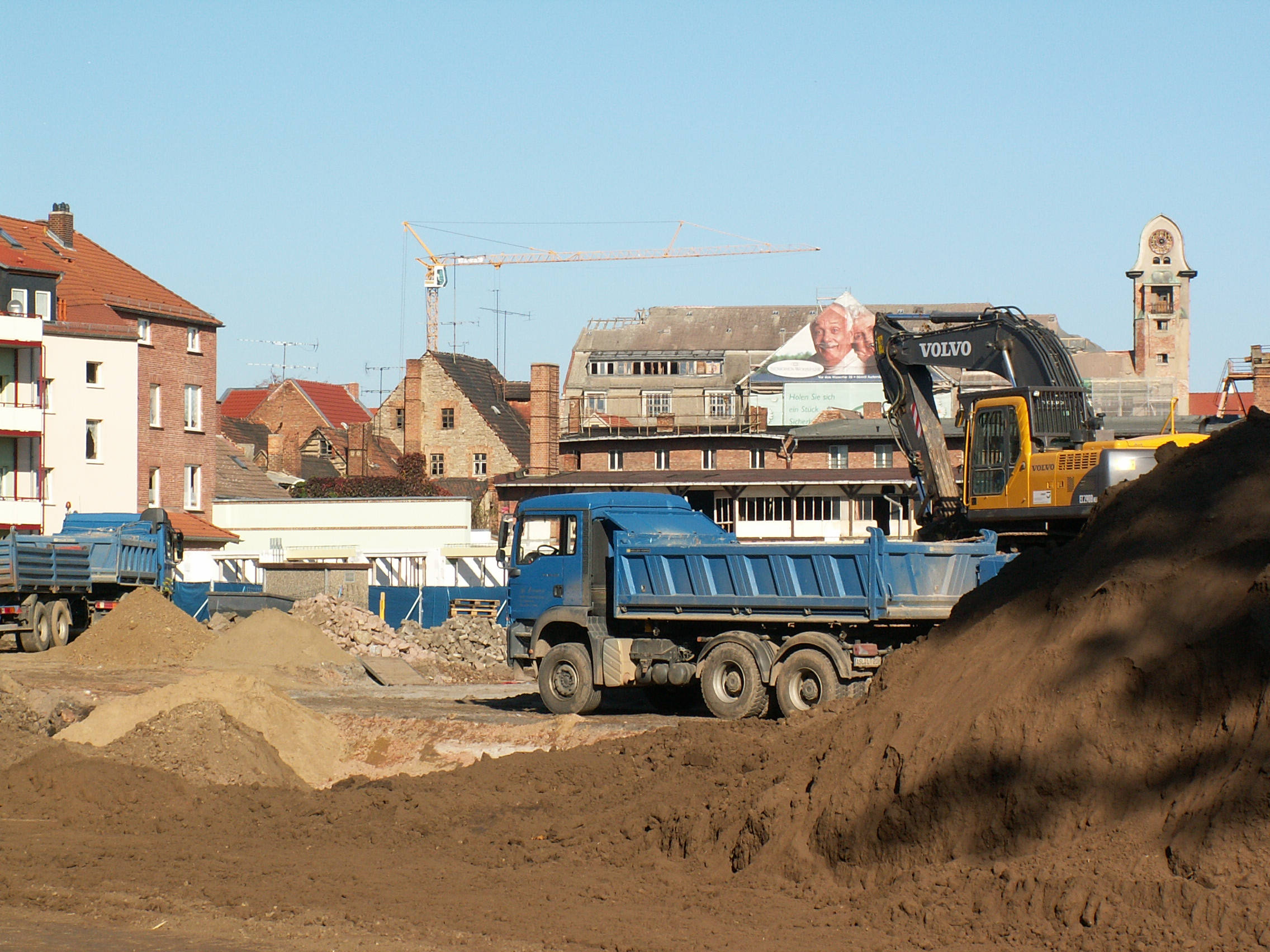 Baustelle an den Eineterrassen